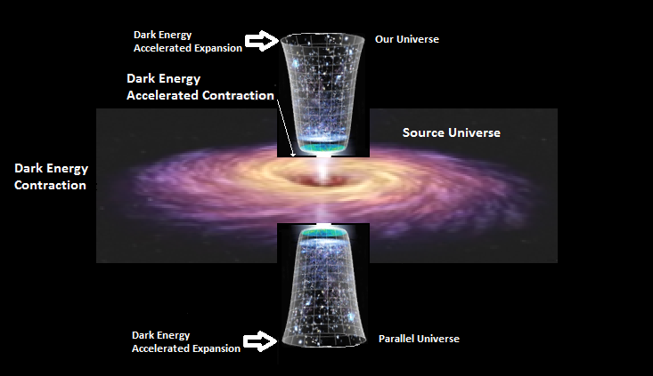 Célula Cósmica com universo fonte e universos paralelos vinculados conforme modelo "Universo Sustentável"